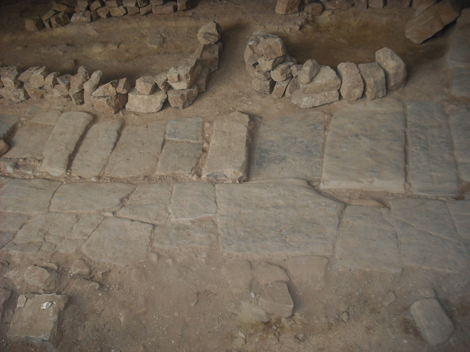 Restes de la Via Augusta a Sagunt.